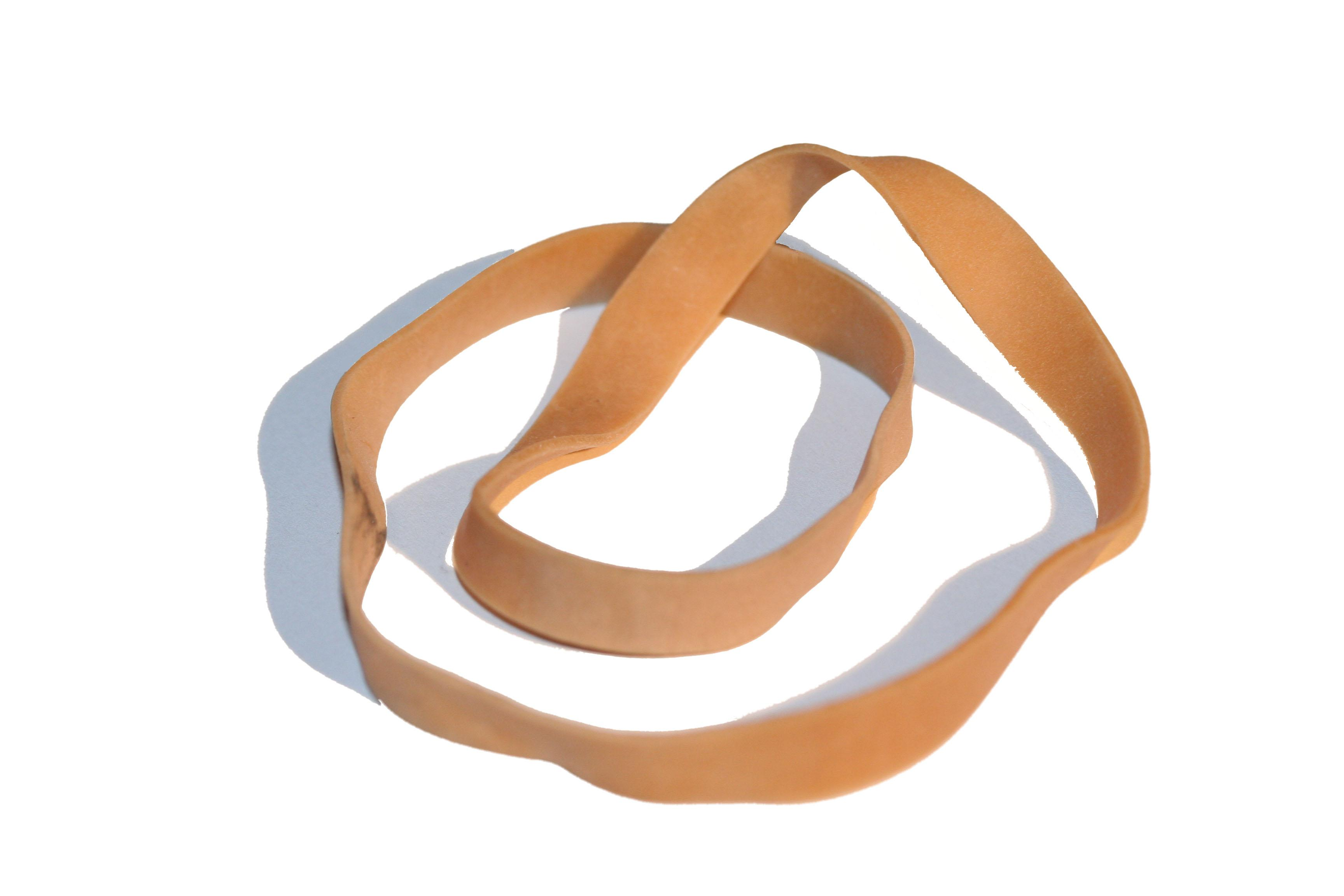 Elastiek